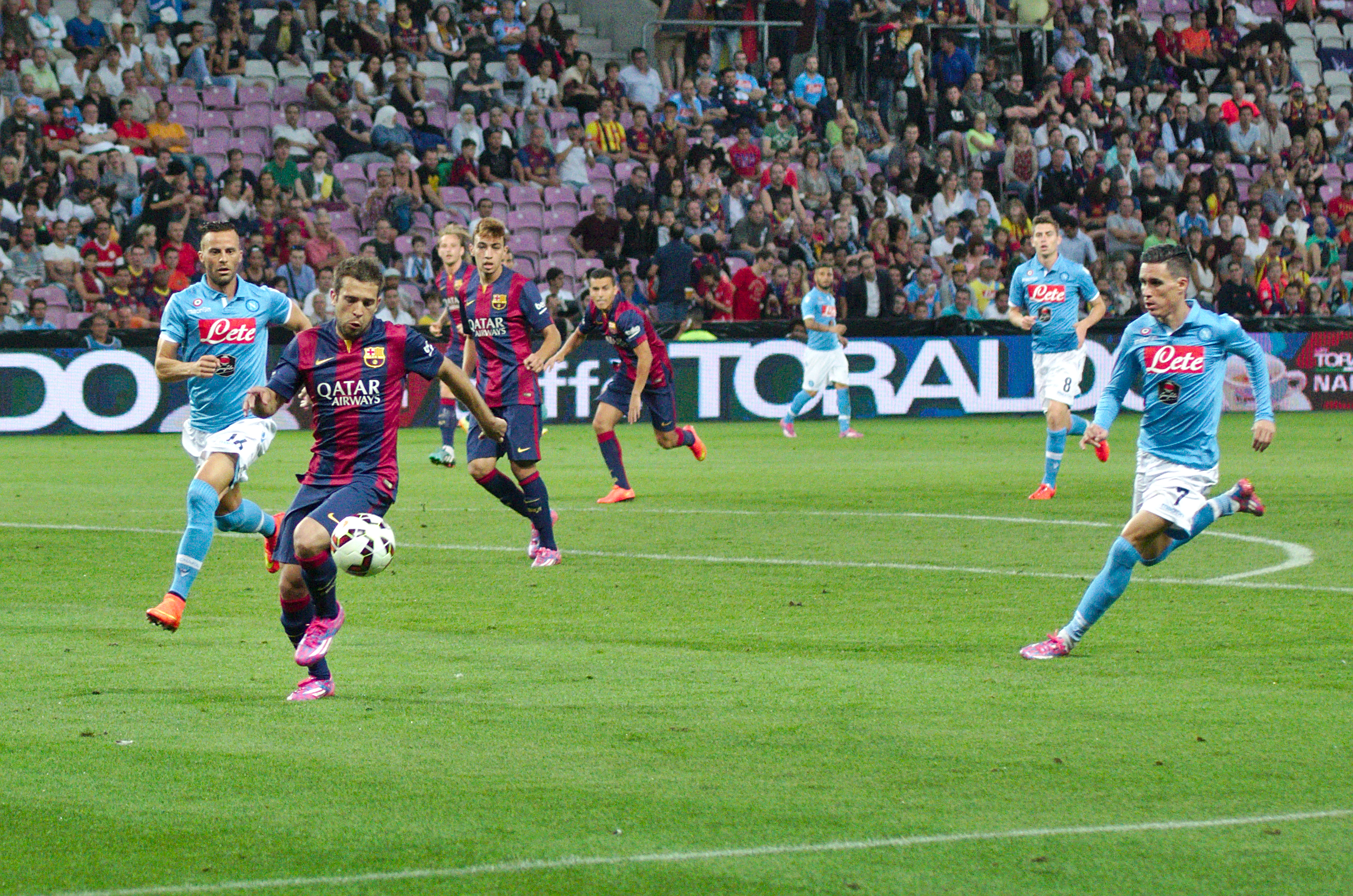 Barça - Napoli - 20140806